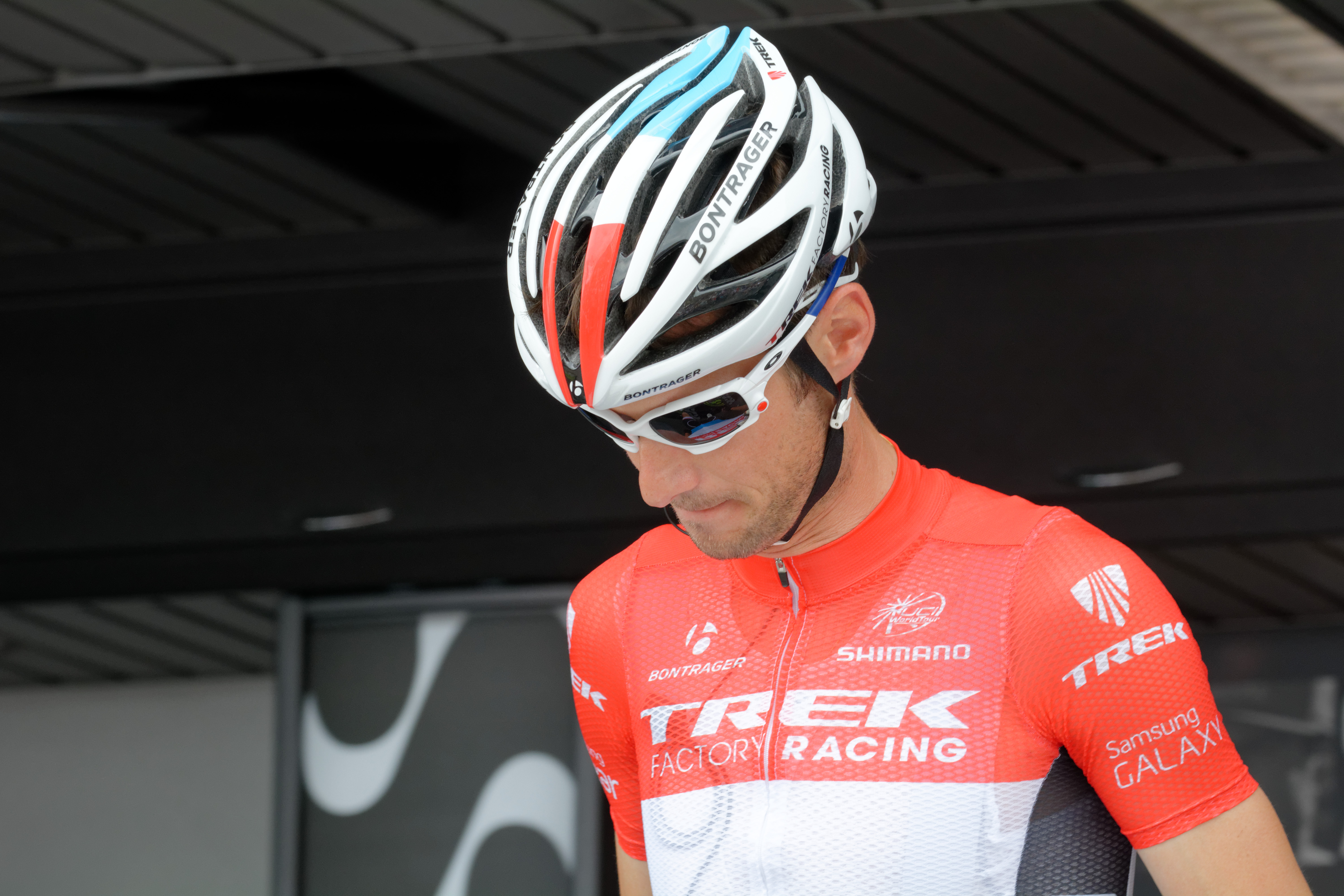 D71_0068_DxO